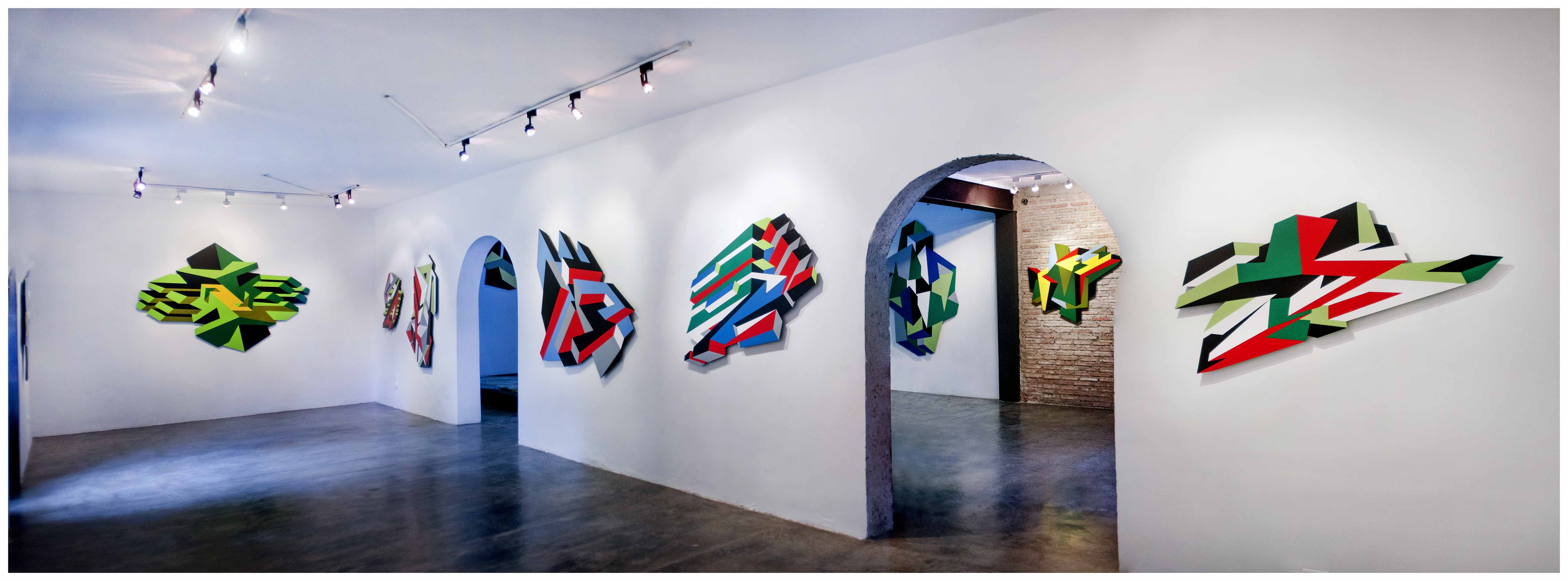 Vista panoramica de las salas del CADS en la exposición Angel Hernandez año 2015.